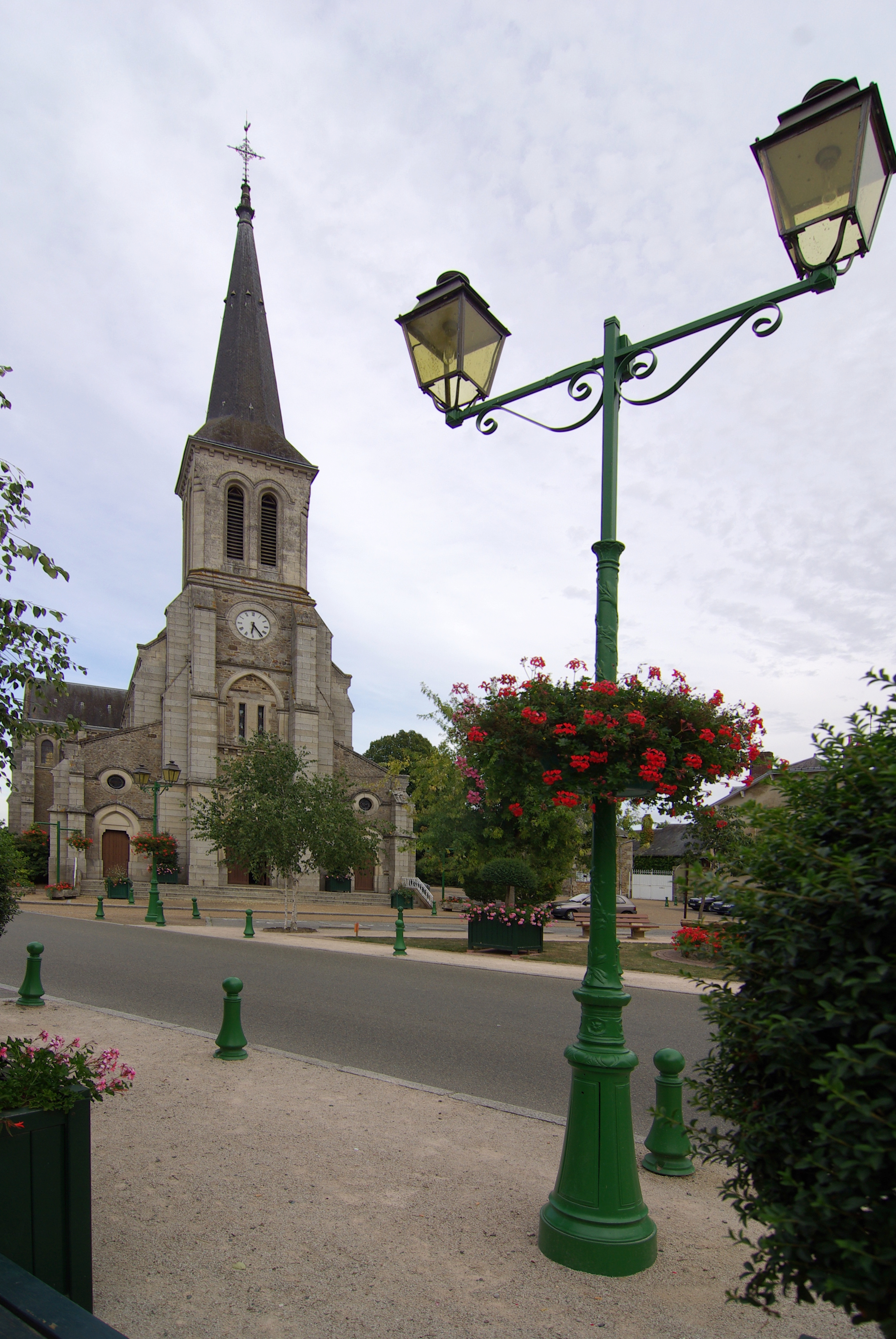 L'église de Saint-Pierre-des-Nids en Mayenne.